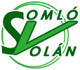 Somló Volán logo